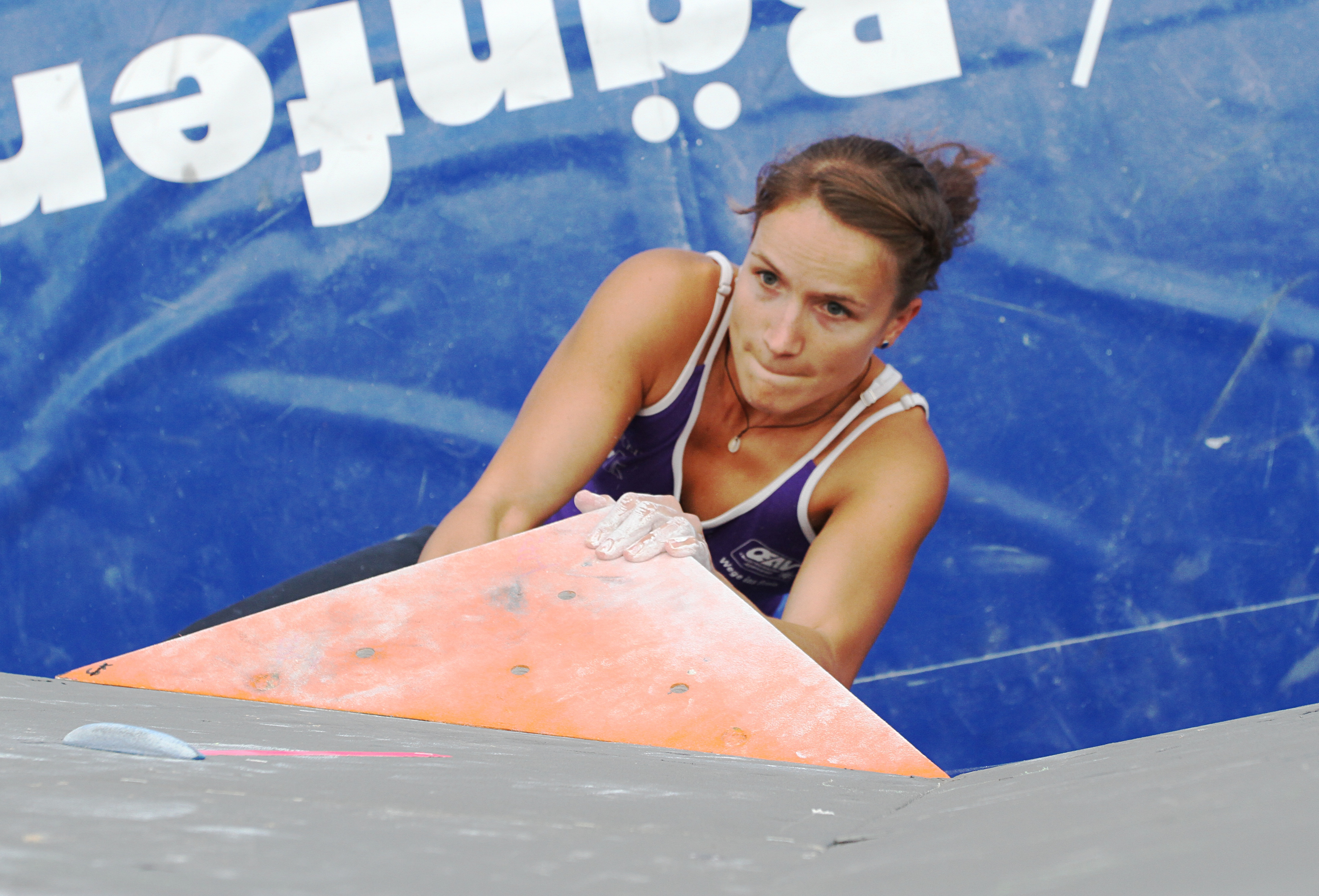 Anna Stoehr, AUS